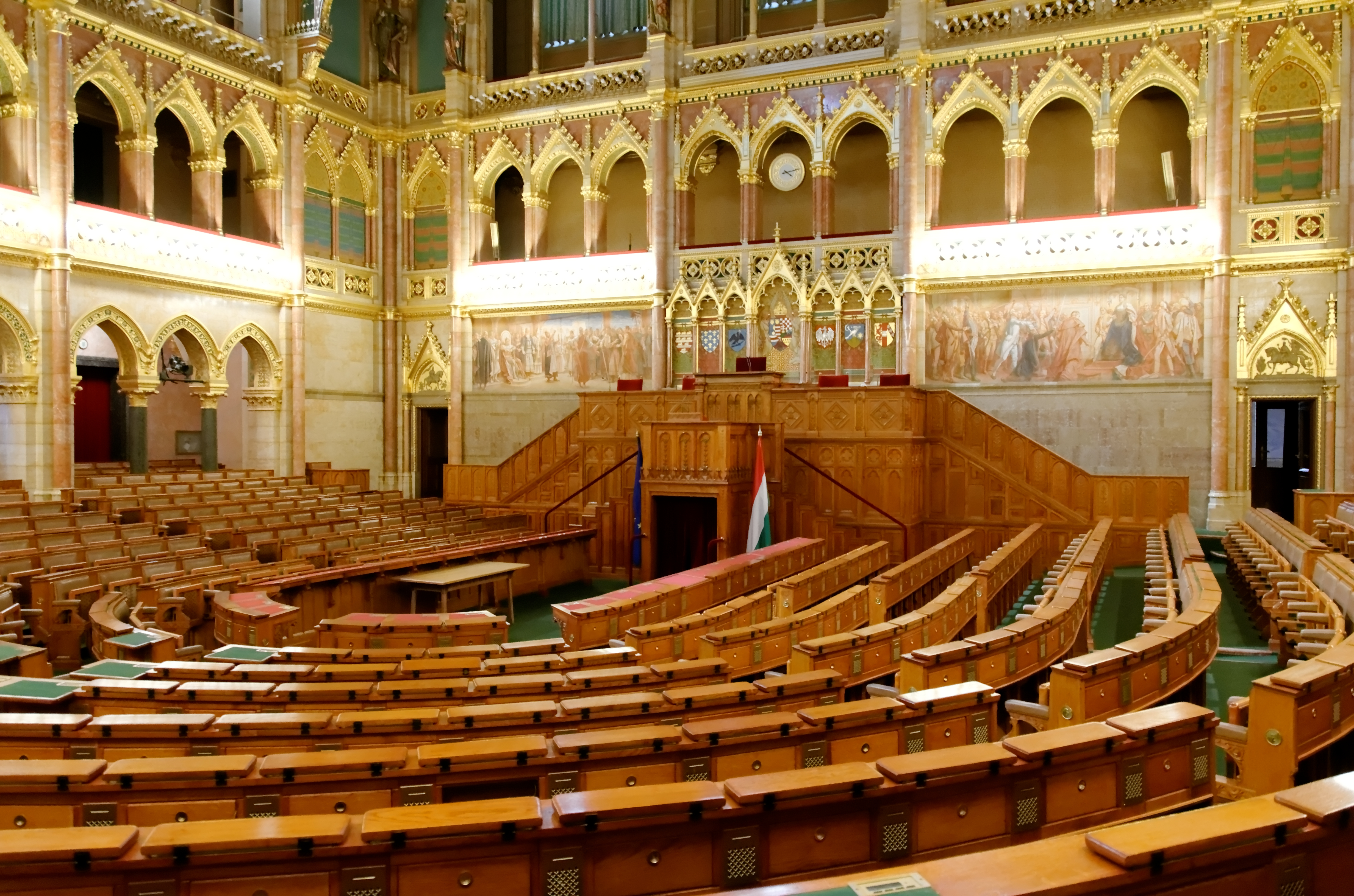 La chambre des députés du parlement hongrois à Budapest. Derrière le pupitre du président sont représentés les armoiries des principales familles ayant régné sur la Hongries ; elle sont encadrées par deux peintures de commande signées Zsigmond Vajda.